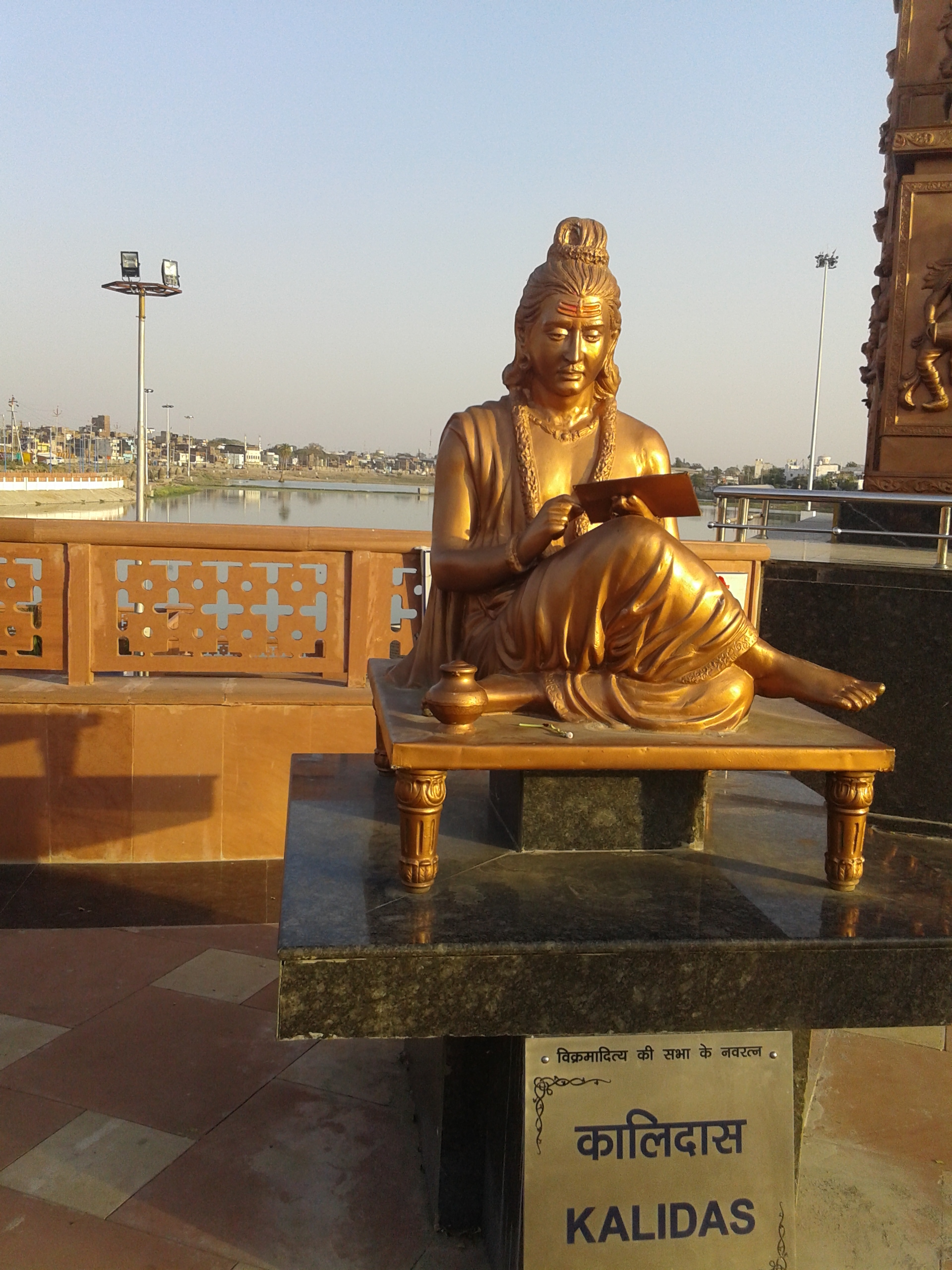 संस्कृतम्: विक्रमादित्यस्य रत्नेषु अन्यतमः